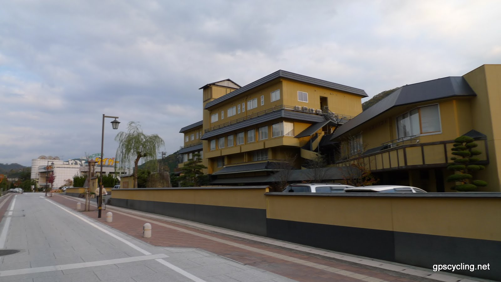 湯郷温泉